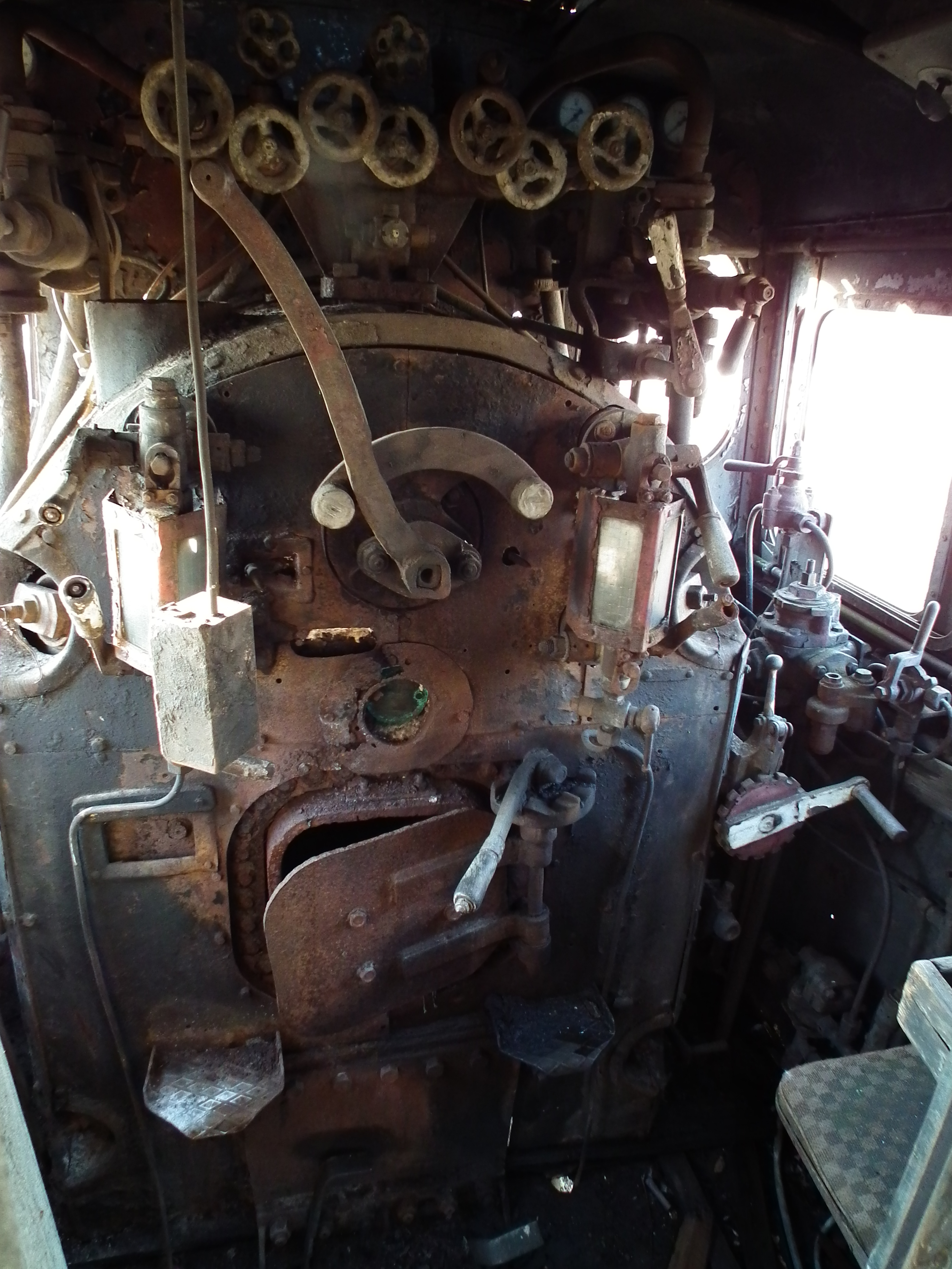 Zbiersk. Px48-1726